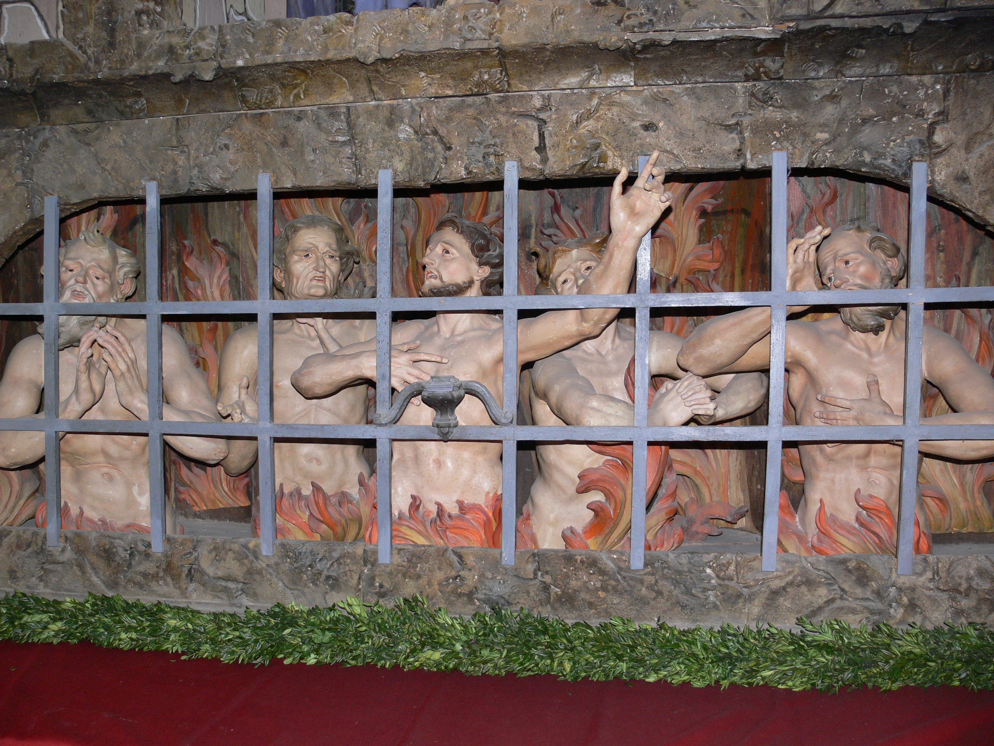 Marienmünster Dießen (ehem. Augustiner-Chorherren-Kirche Mariä Himmelfahrt, heute Pfarrkirche, Dießen am Ammersee) Kerkerheiland von F. X. Schmädl (in der südl. Seitenkapelle der Vorhalle), um 1738/1739, Detail: Seelen im Fegefeuer